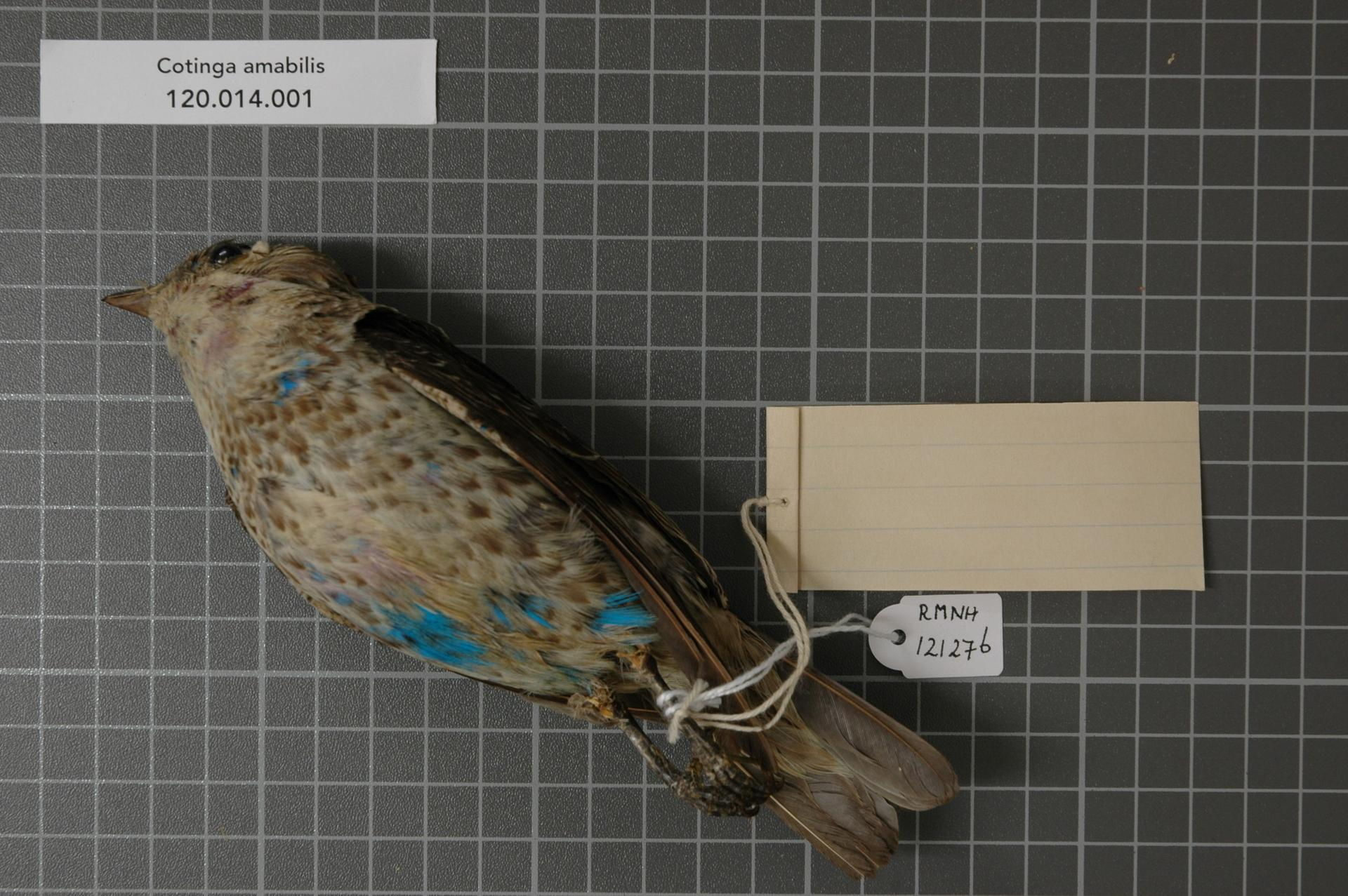 Cotinga amabilis Gould, 1857